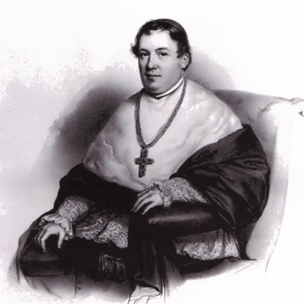 Lonovics József (1793–1867) magyar főpap. Joseph Kriehuber litográfiája.